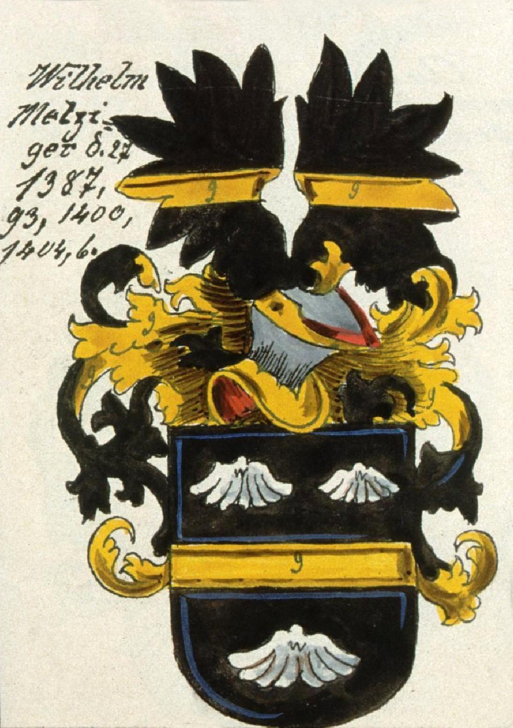 Wilhelm Metziger der 27. Ammeister 1387, 93, 1400, 1404, 6. Bibliothèque nationale et universitaire de Strasbourg